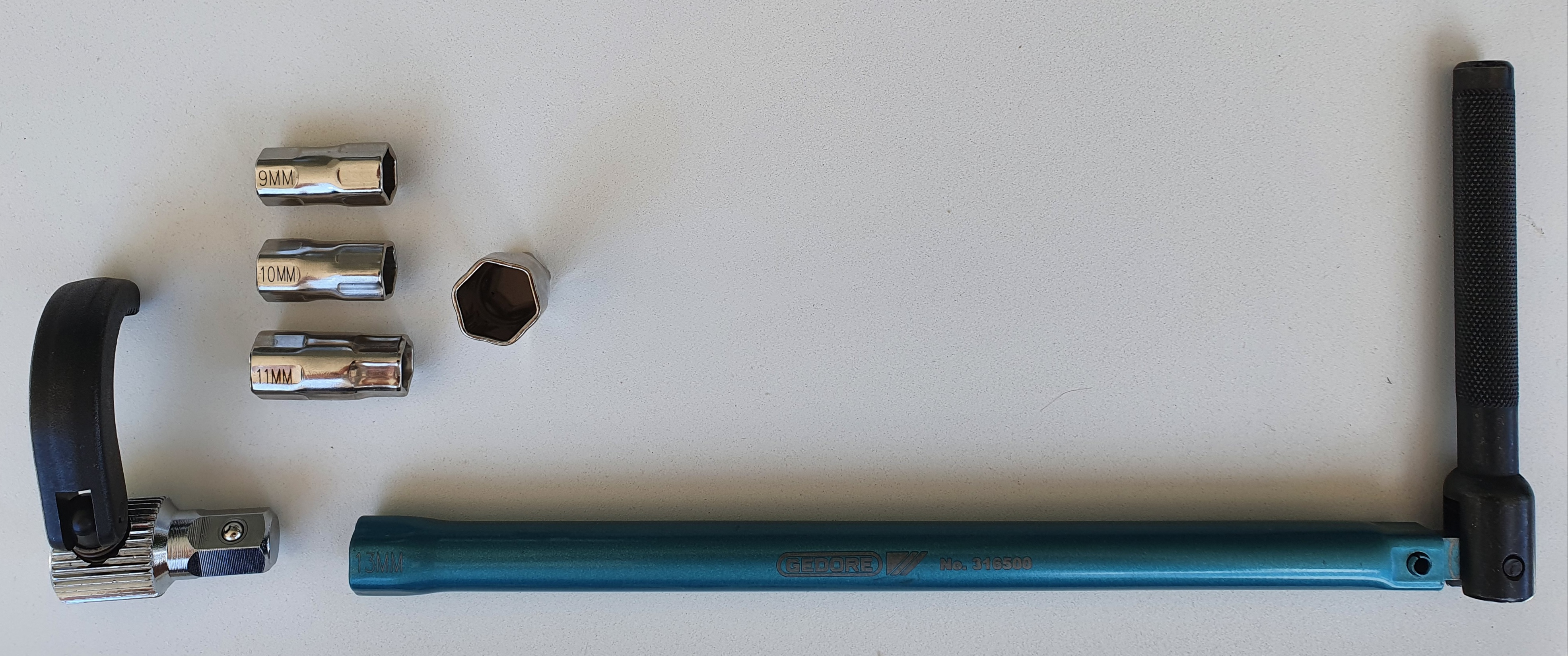 Standhahnmutterschlüssel mit Klaue und Steckschlüssleinsätzen